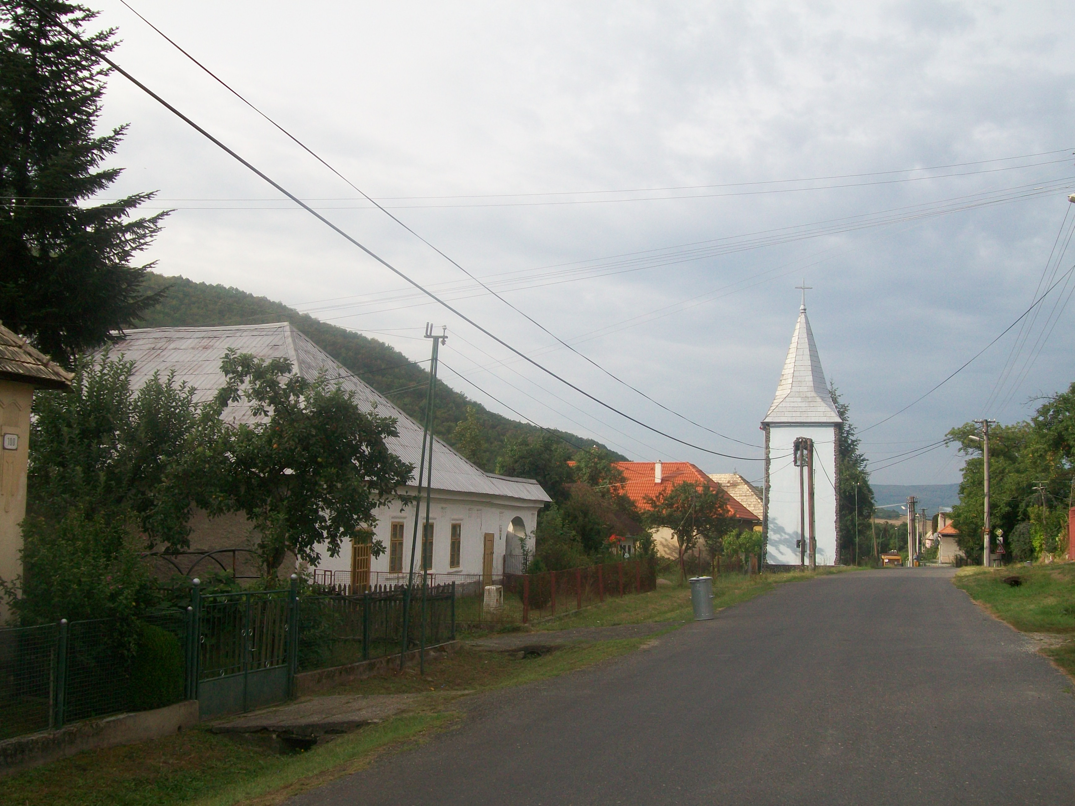 Ulica obce Kotmanová